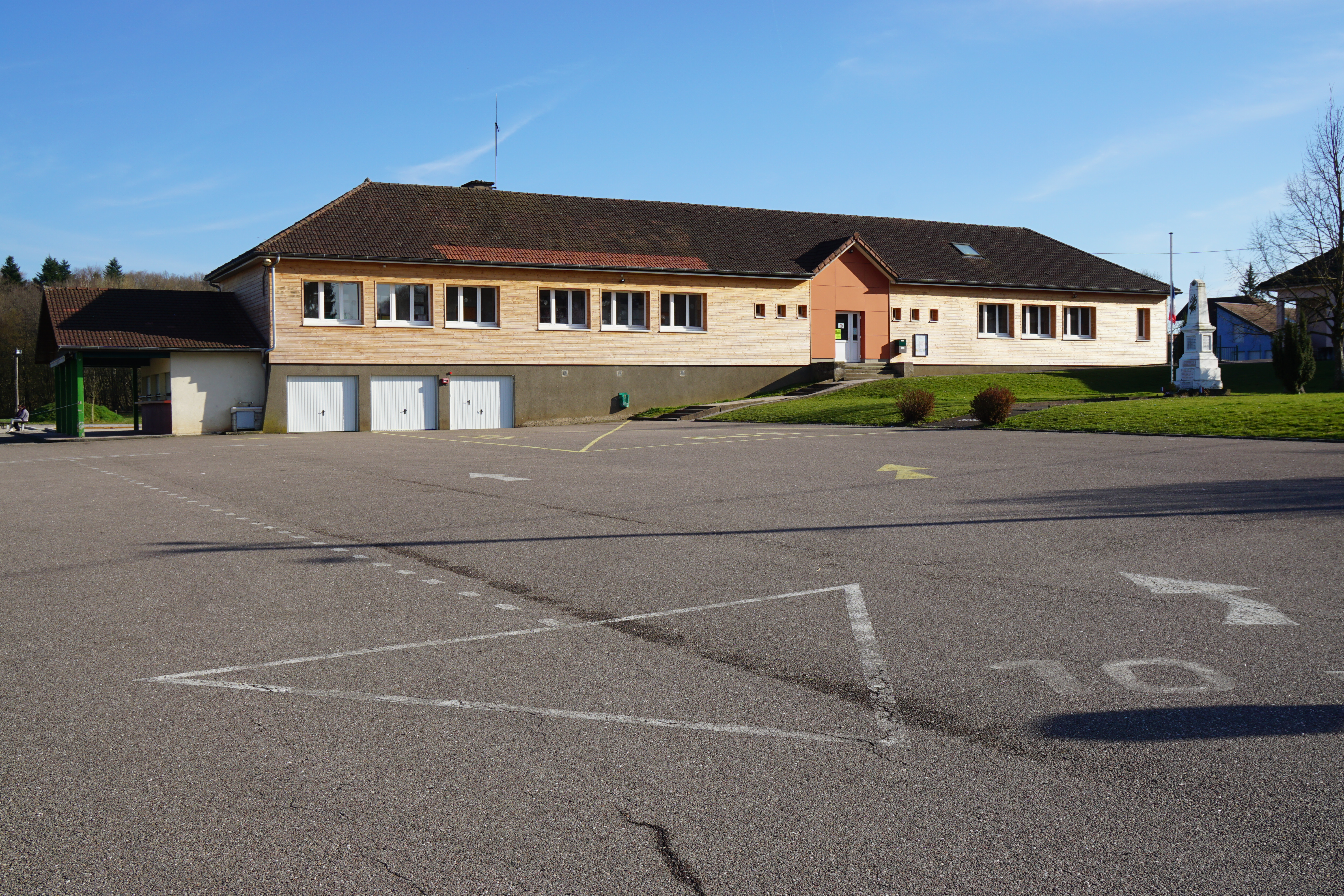 L'école d'Athesans-Étroitefontaine.